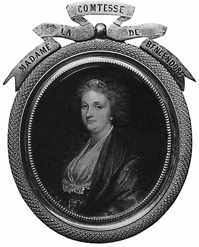 Anna-Iuliana Benkendorf, geb. Freiin Schilling von Cannstatt, 1758-1797